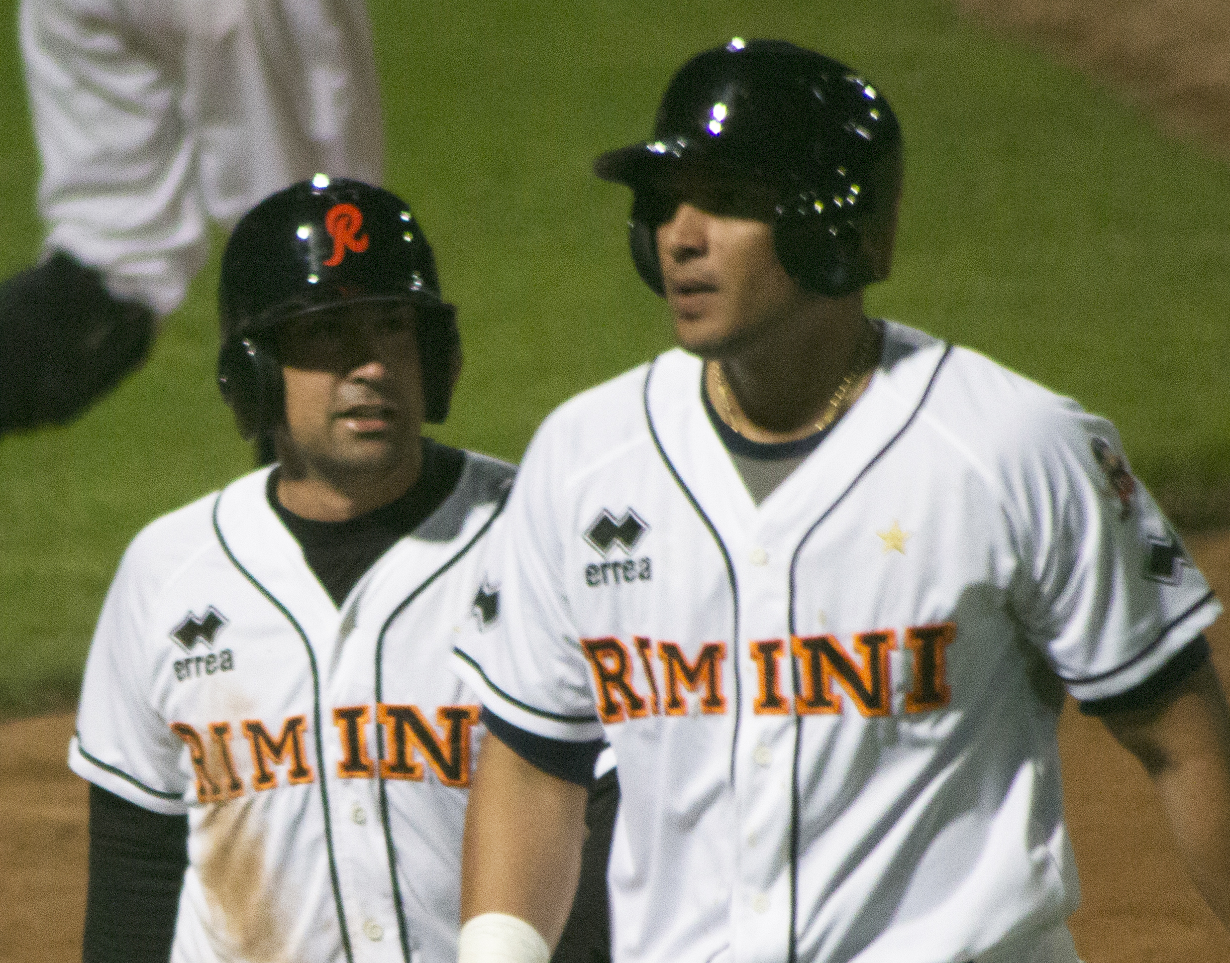 Jack Santora e Alex Romero durante Rimini-Bologna, gara valida per l'Italian Baseball League 2013. Foto scattata da me dagli spalti con obiettivo 70-300.